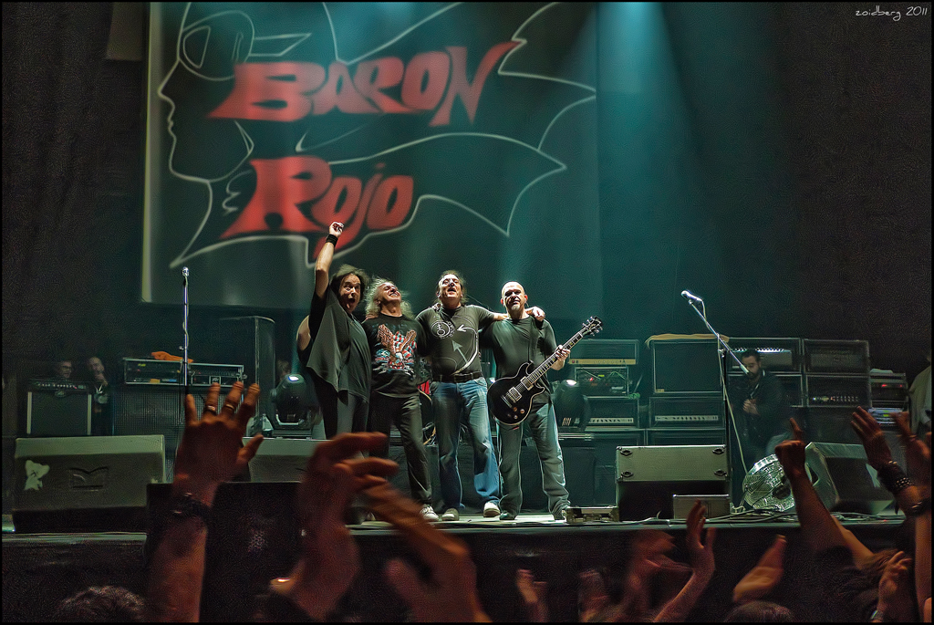 Barón Rojo, Madrid 22/10/2011